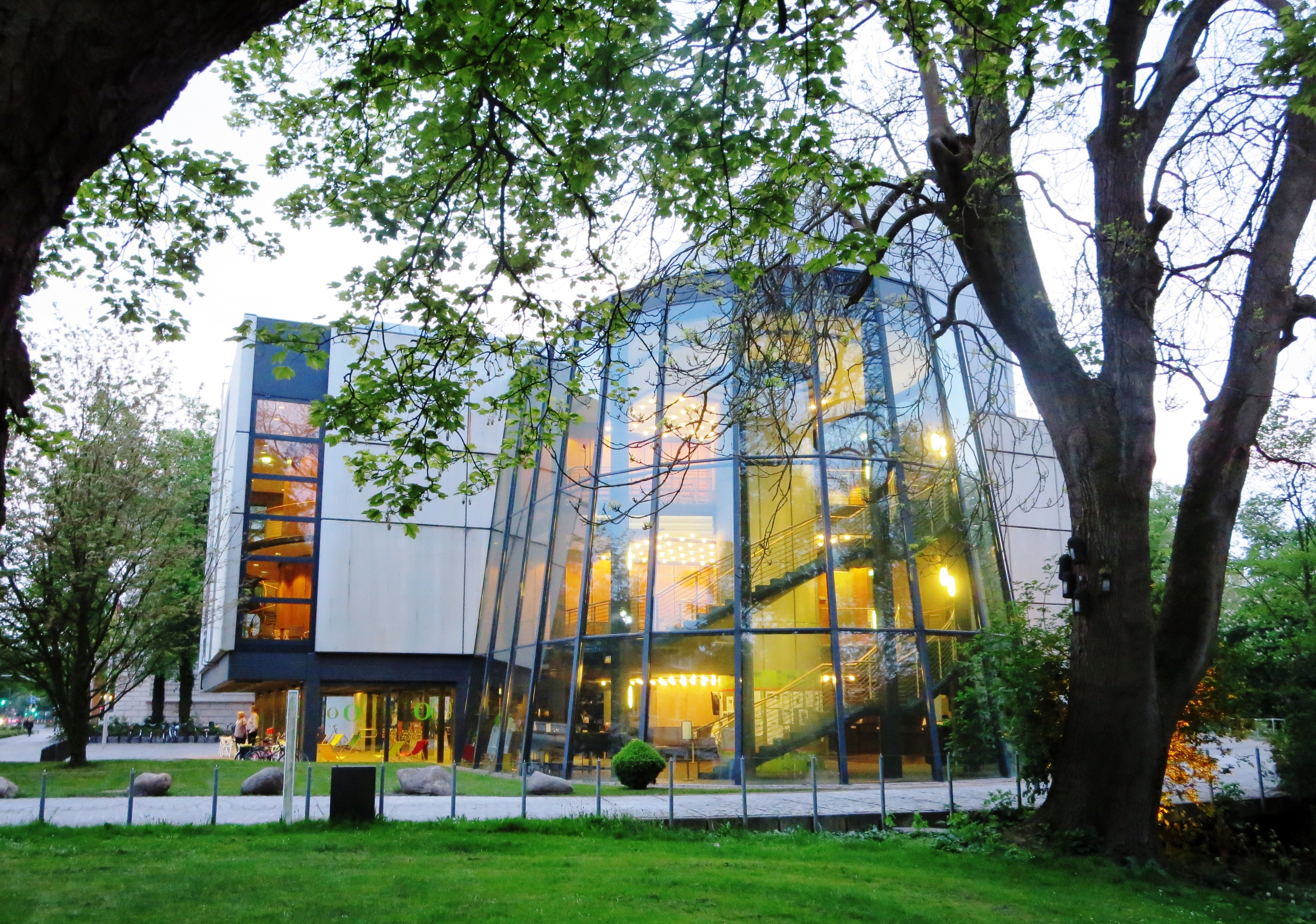 Das Kleine Haus des Oldenburgischen Staatstheaters